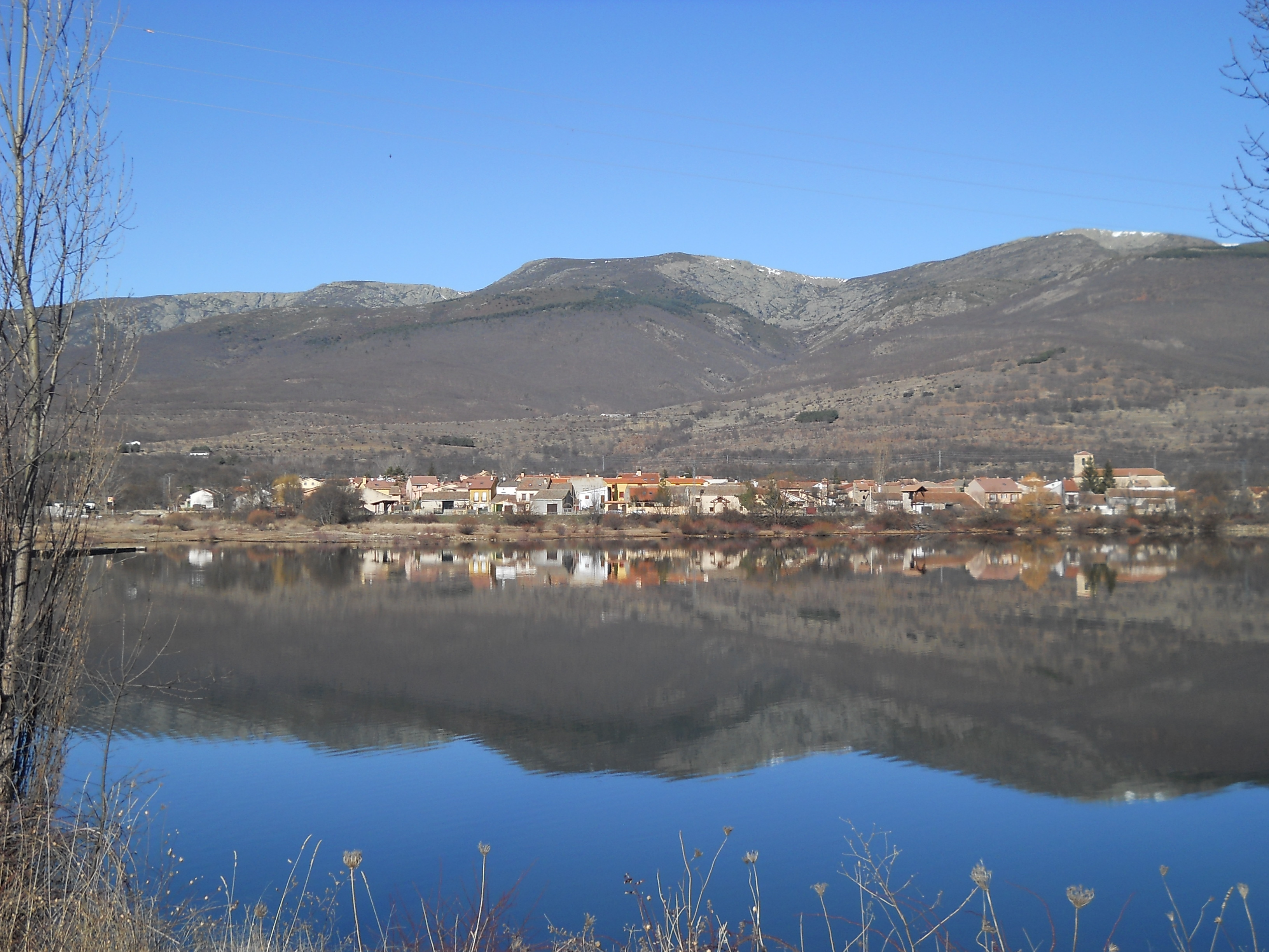 Pinilla del Valle reflejado en el embalse de Pinilla, Comunidad de Madrid, España